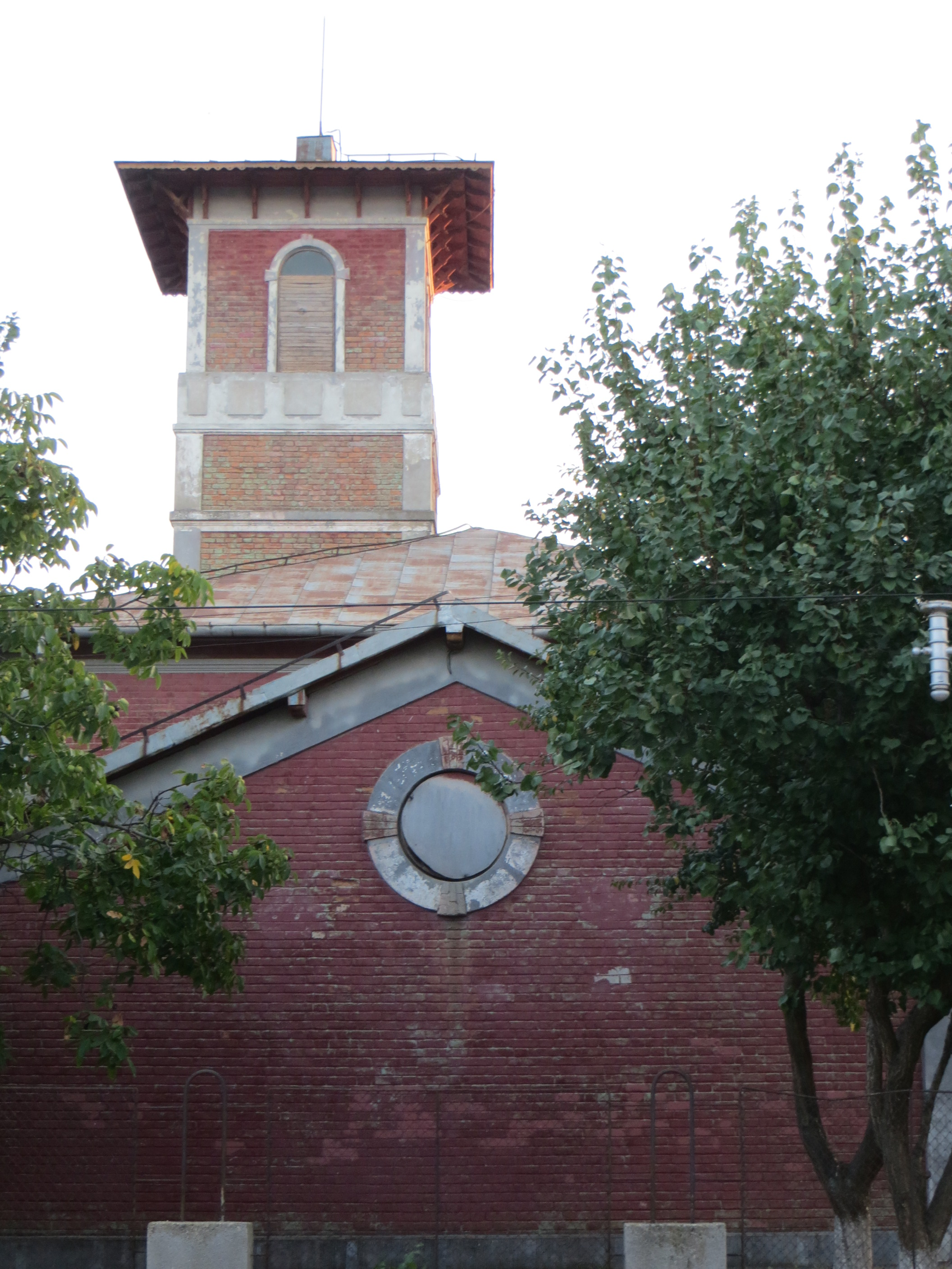 Arhivele Statului